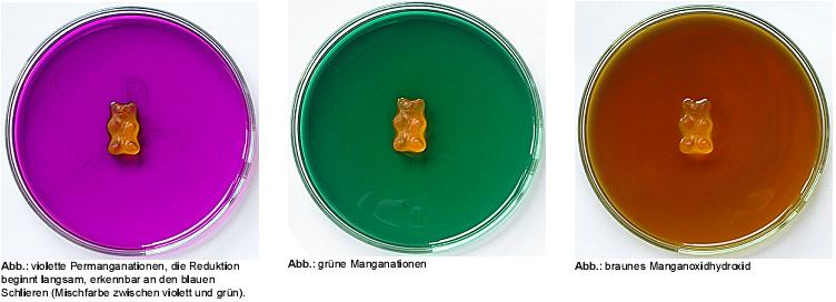 Glucosenachweis durch die Reduktion von Kaliumpermanganat am Beispiel von Gummibärchen